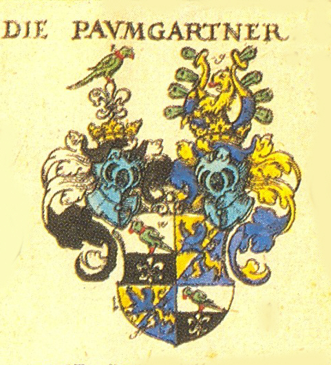 Wappen der Nürnberger und Augsburger Patrizierfamilie Paumgartner von Holnstein und Grünsberg